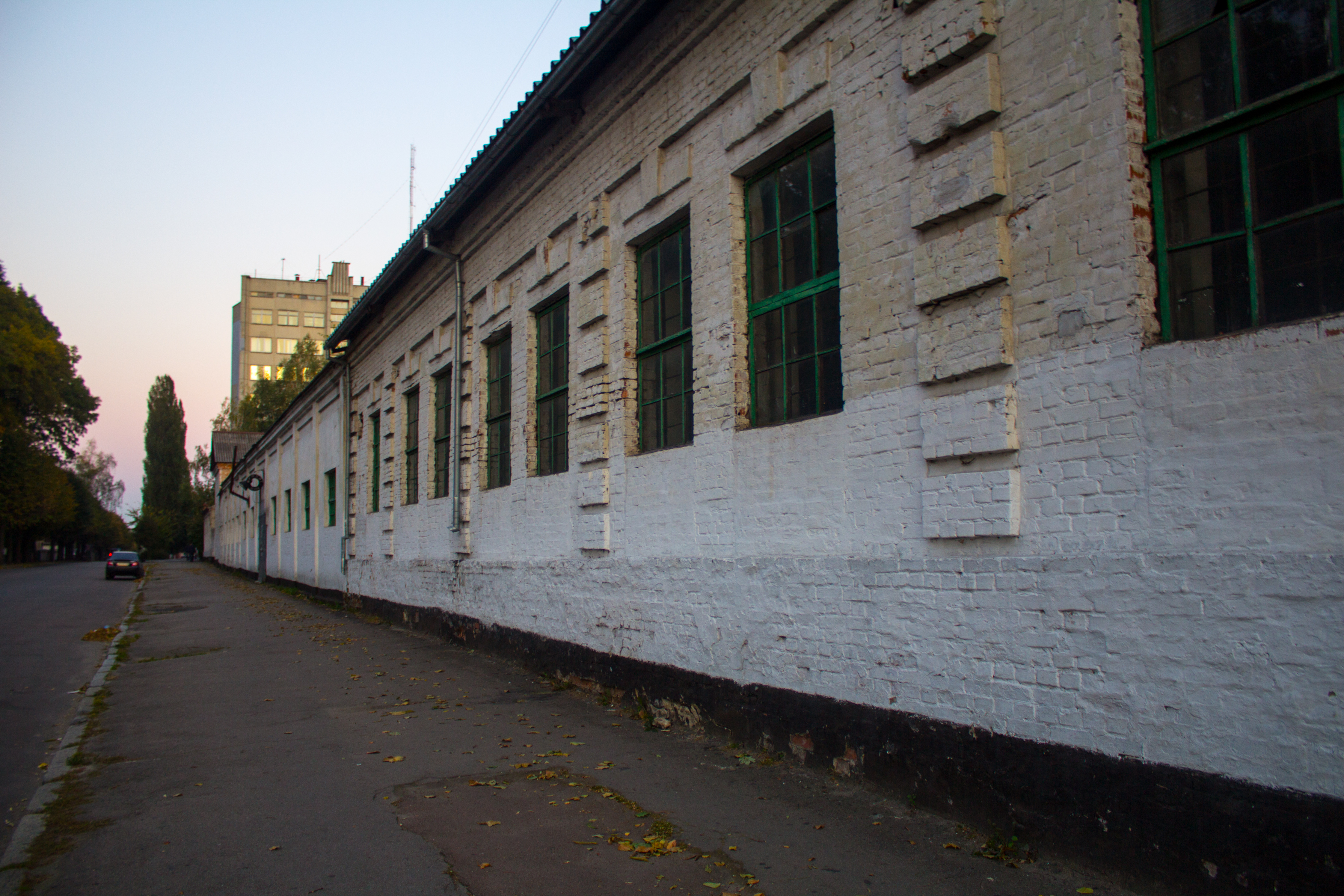 Стайні (Комплекс споруд Поштової станції), Житомир, вул. Перемоги, 72